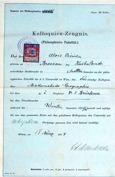 Eduard Brückner Kolloquienzeugnis Kollegium Mathematische Geografie Luigi Visintin 1914